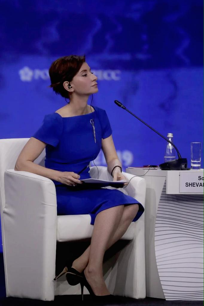 София Шеварднадзе на ПМЭФ